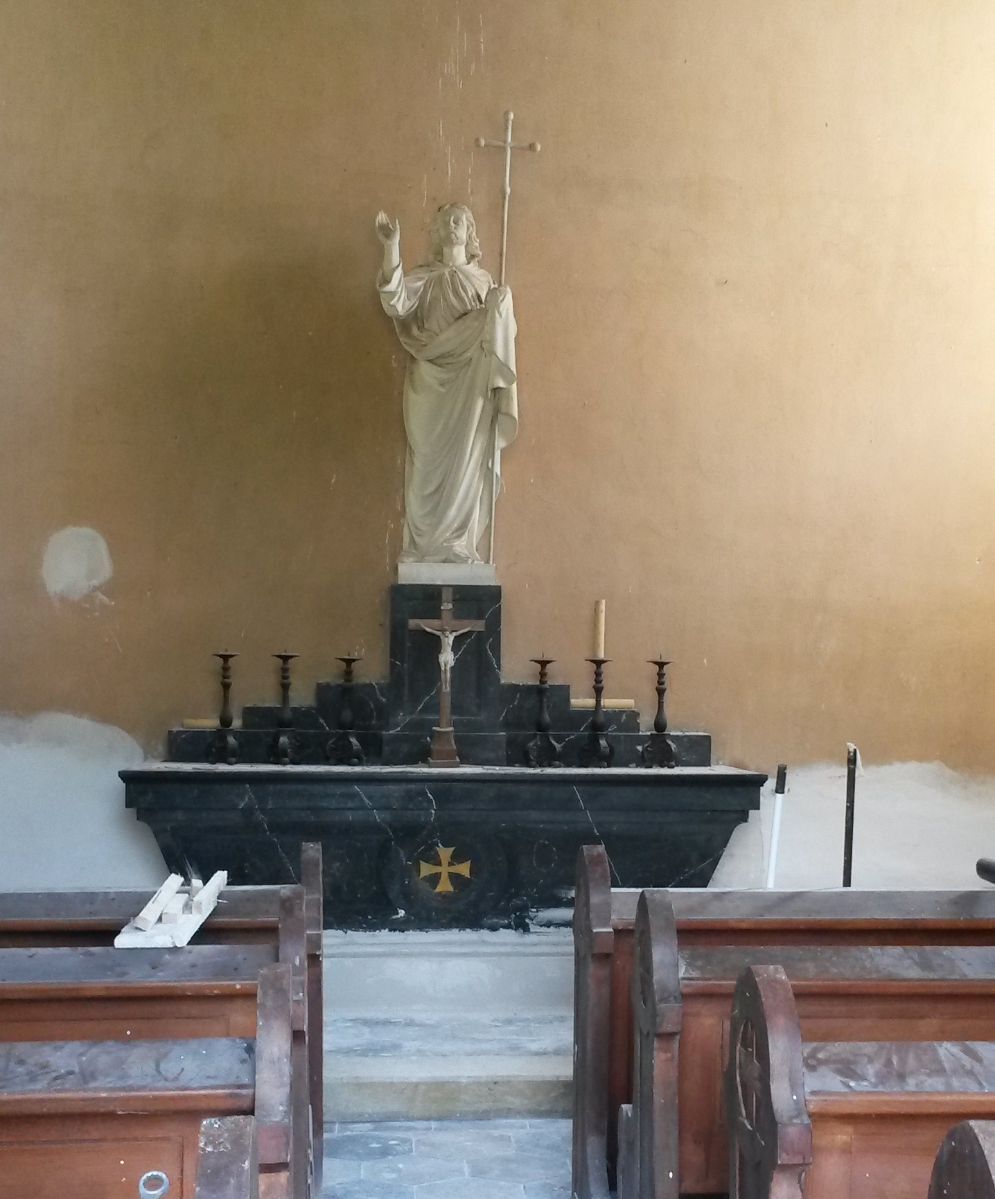 Innenansicht der Gruftkapelle